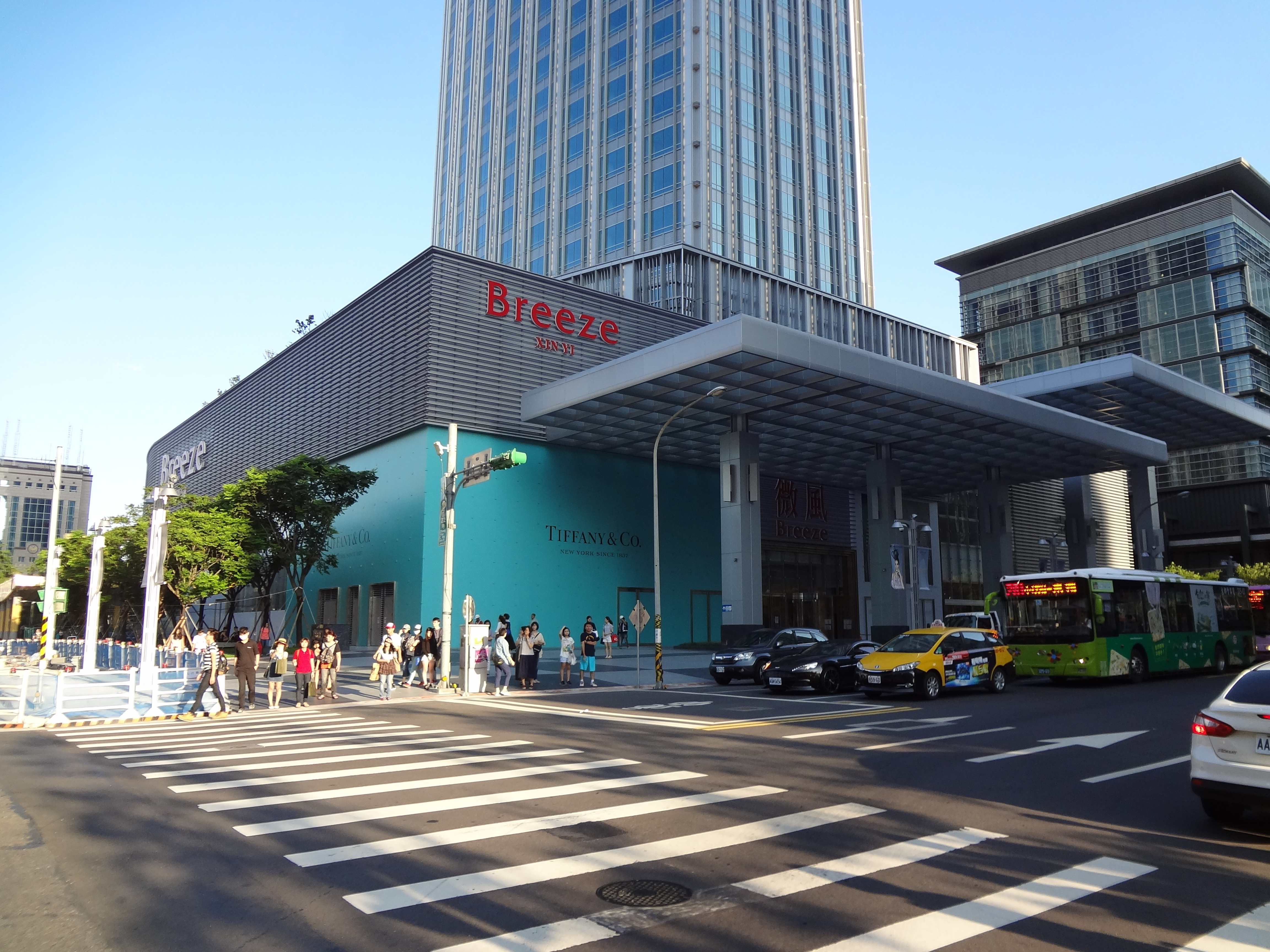 中文（台灣）: 微風信義，位於國泰置地廣場。